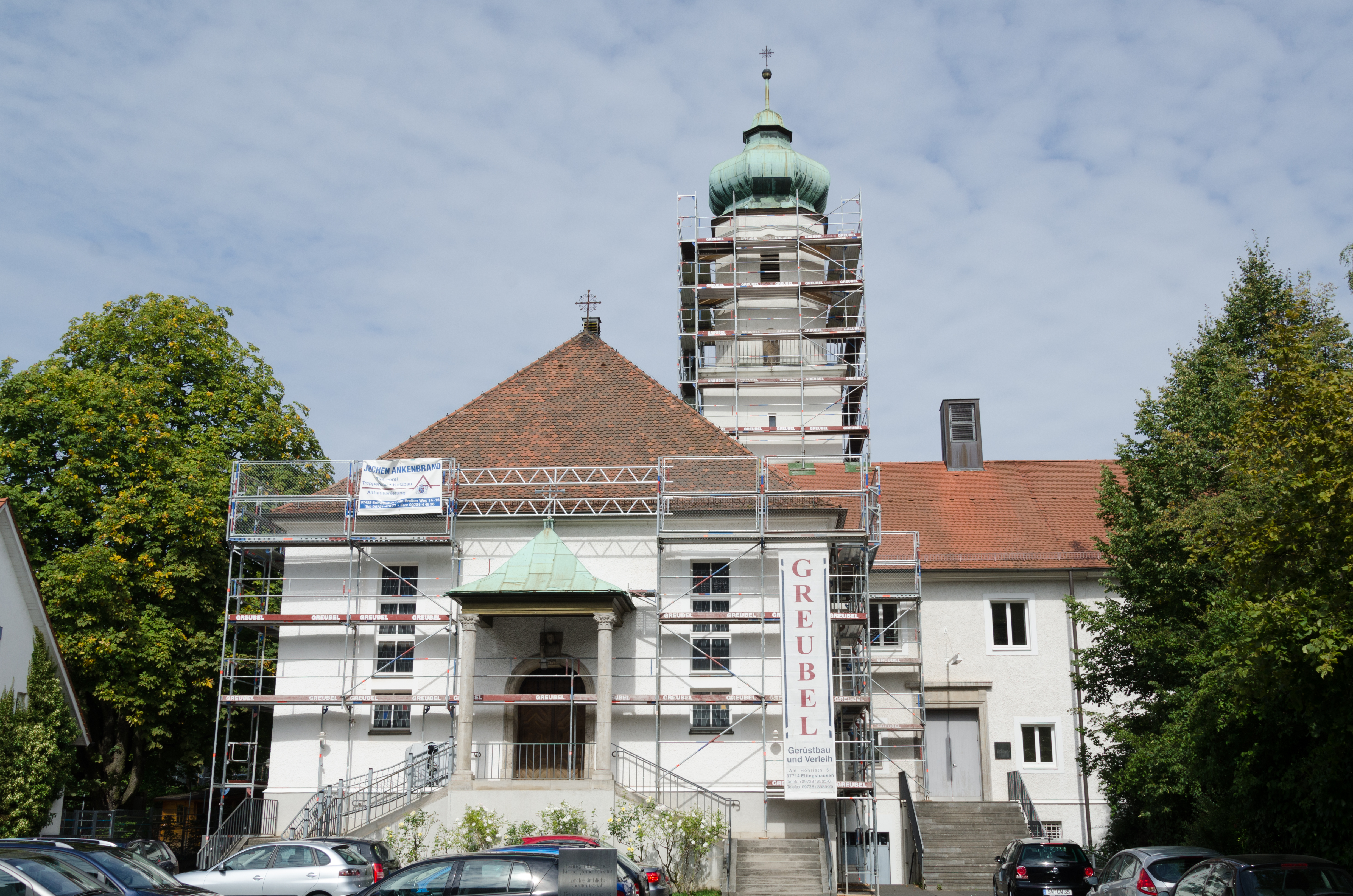 Schweinfurt, Friedenstraße 23